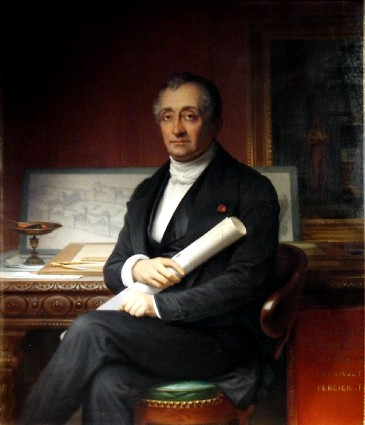 Louis Visconti (1791-1853), architecte français